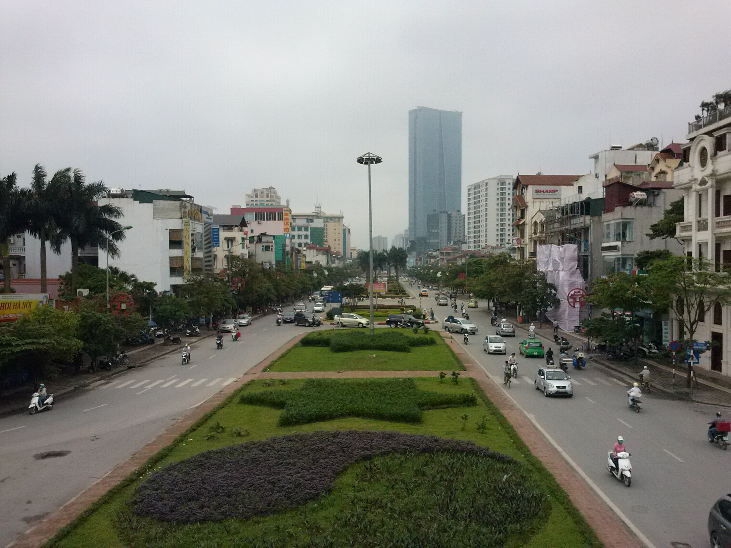 Phố Văn Cao nhìn từ trên đường Hoàng Hoa Thám.